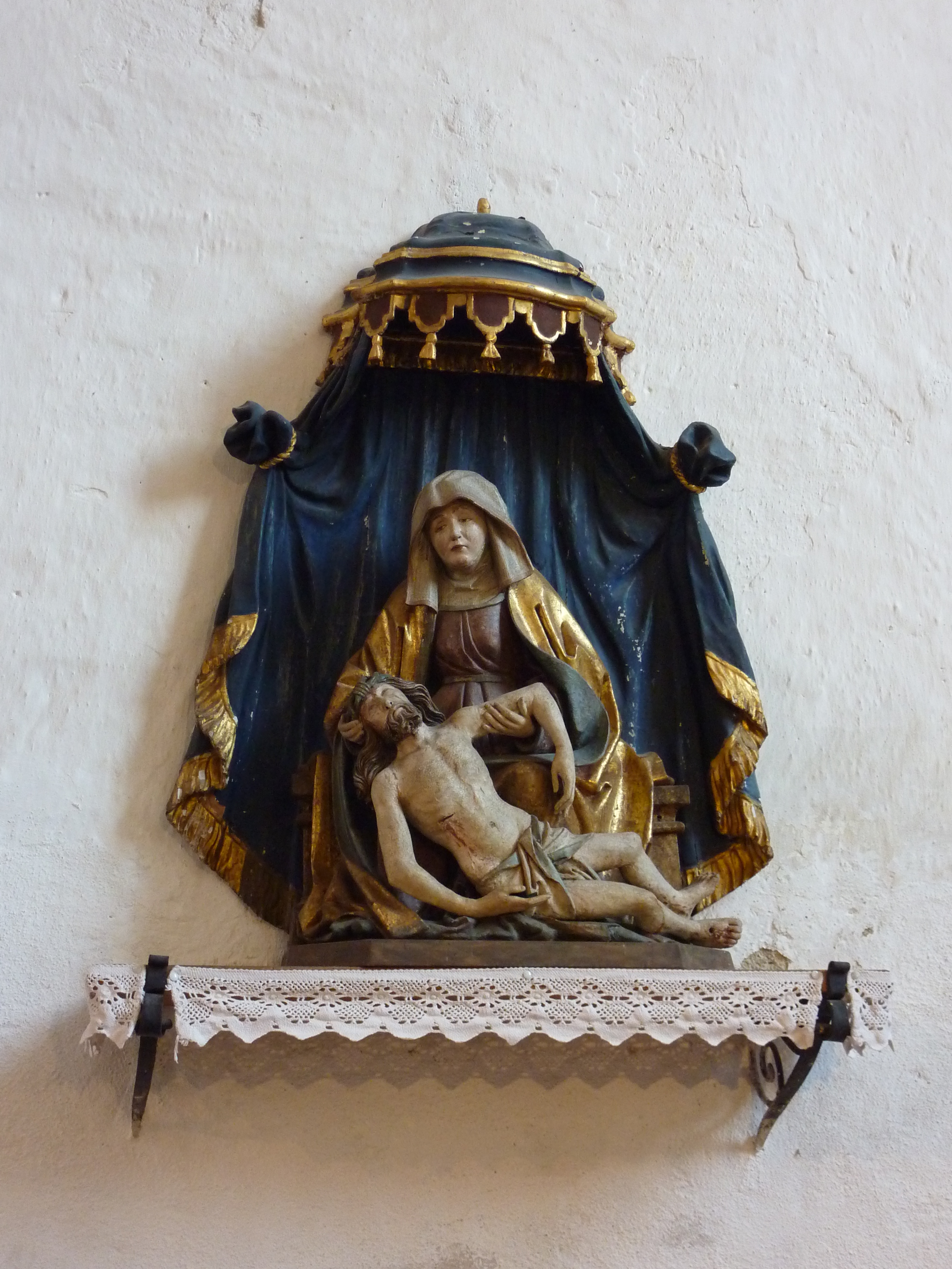 Filialkirche in St. Michael, Weißenkirchen in der Wachau, Niederösterreich - Statue Pietà (ca. 1500) unter barockem Baldachin